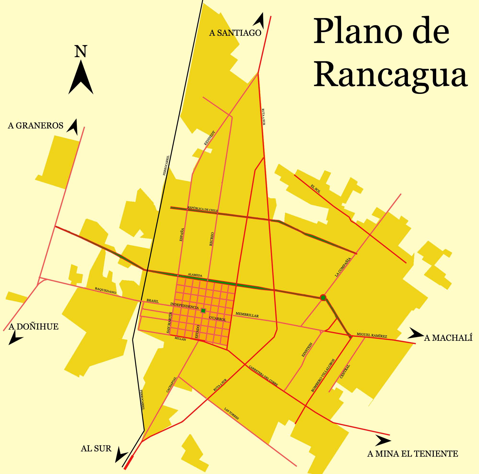 Plano de la ciudad de Rancagua. En rosa y rojo las arterias principales, en negro la línea ferrea y en naranjo el casco histórico de la ciudad.